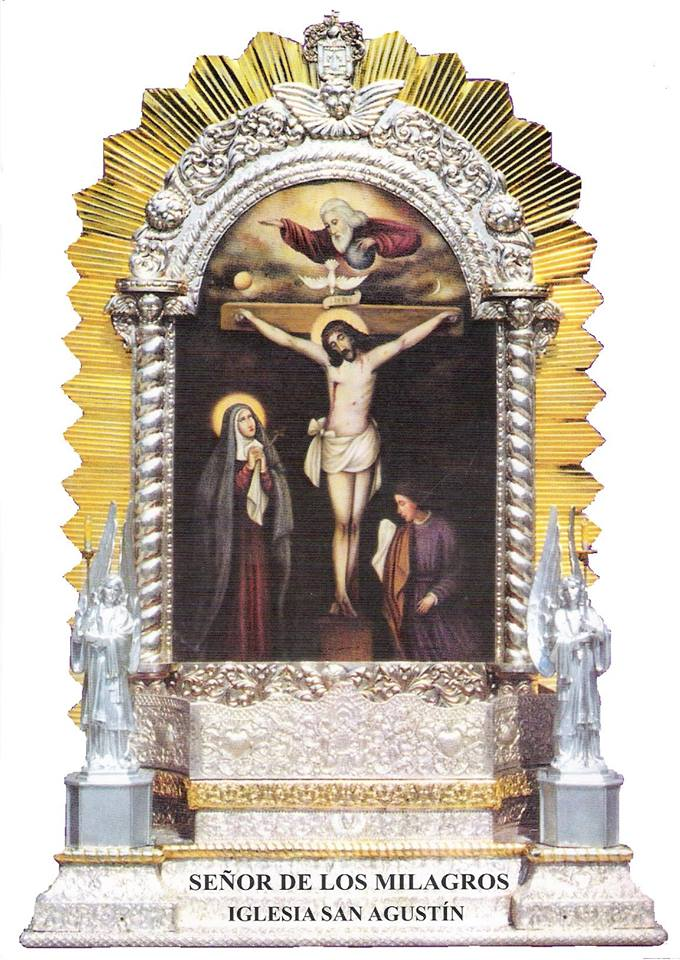 Estampa del Señor de los Milagros de Arequipa